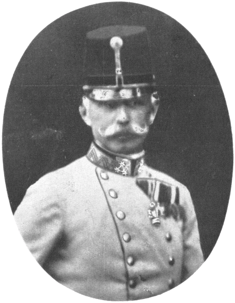 Michael Ludwig Edler von Appel (1856 - 1 February 1915), Austrian general